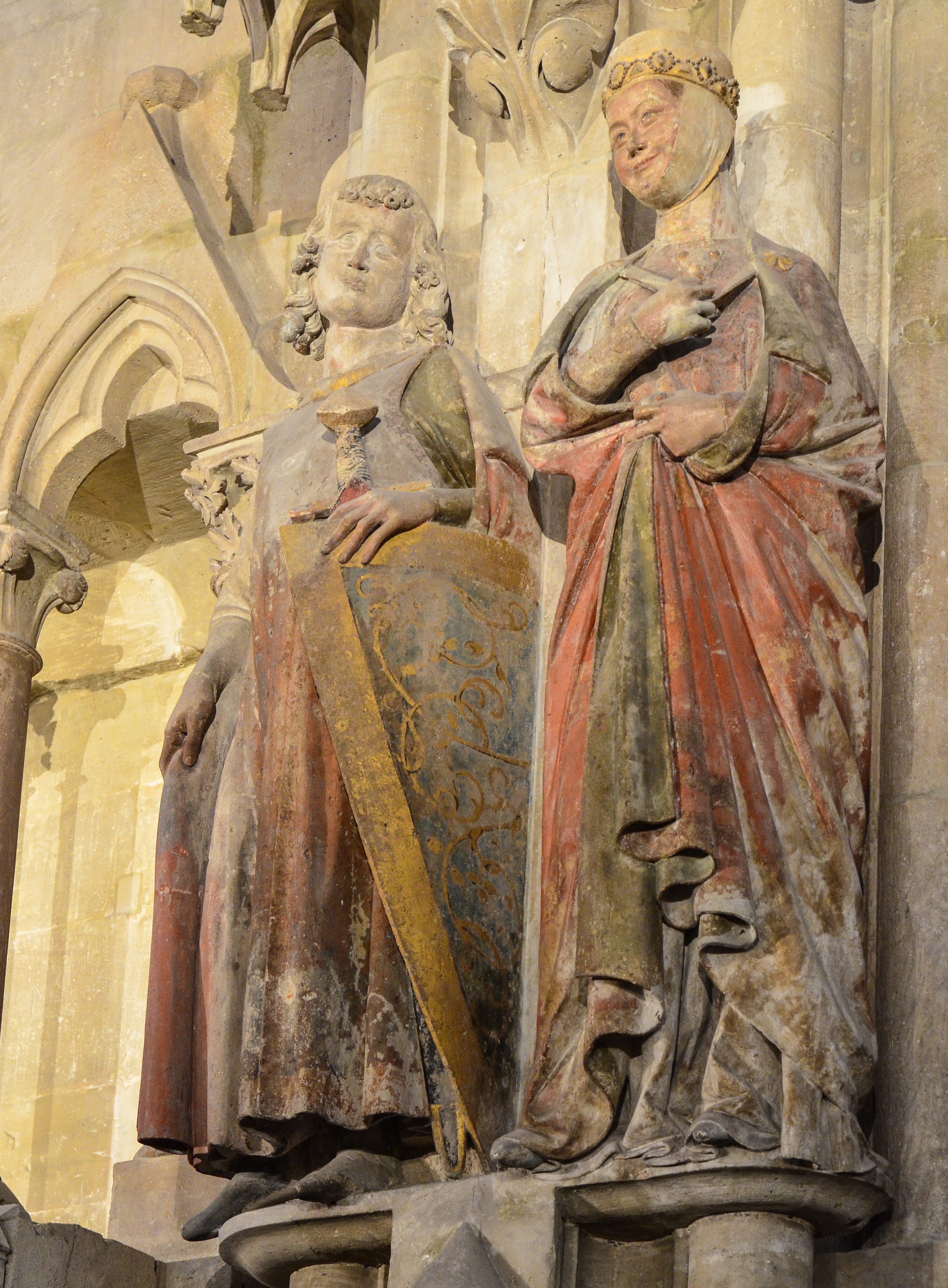 Stifterfiguren Hermann und Reglindis im Dom zu Naumburg